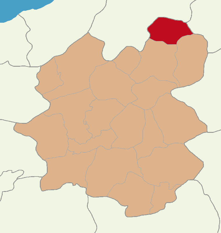 Olur ilçesinin konumu